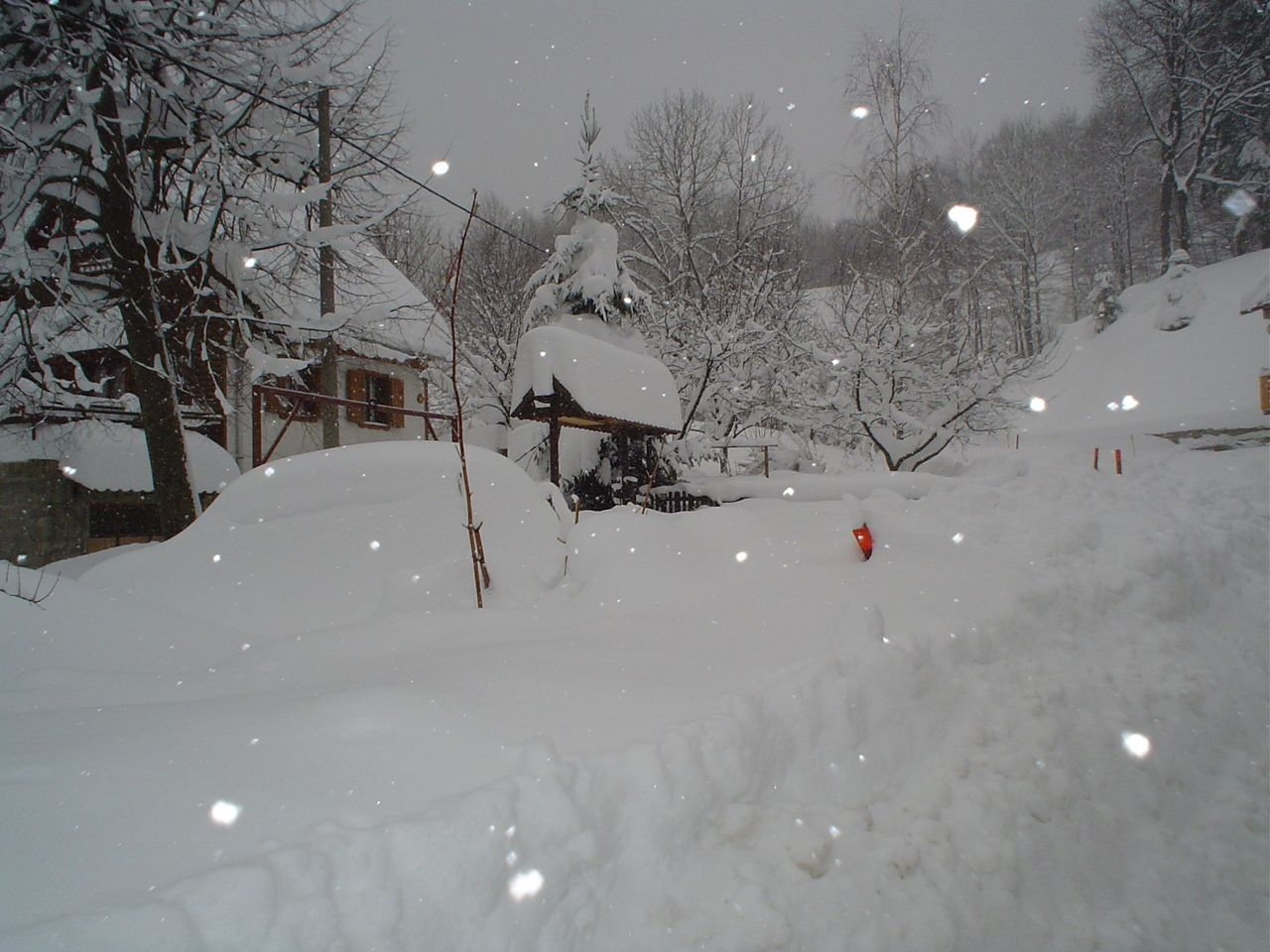 Mrzla Vodica - Lake Lokve - Gorski Kotar